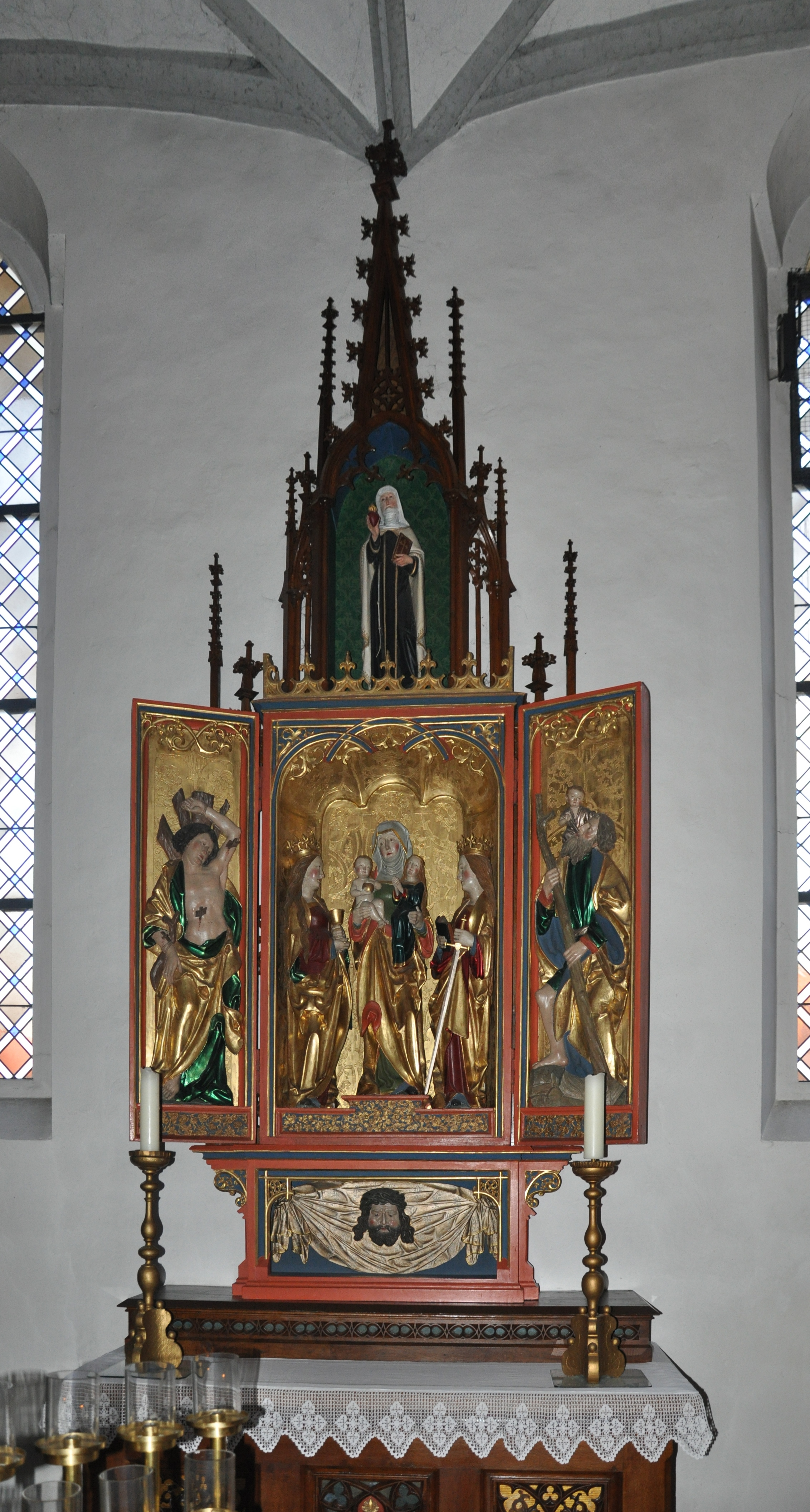 Oberstadion (Alb-Donau-Kreis), Pfarrkirche St. Martinus, Annenaltar (früher in der Gruftkapelle), geöffnet; angeblich von Jörg Stocker d. J., 1520 Schreinfiguren: Hl. Barbara, Muttergottes, Hl. Katharina Flügel (Innenseite): geschnitzte Reliefs Hl. Christopherud und Hl. Sebastian